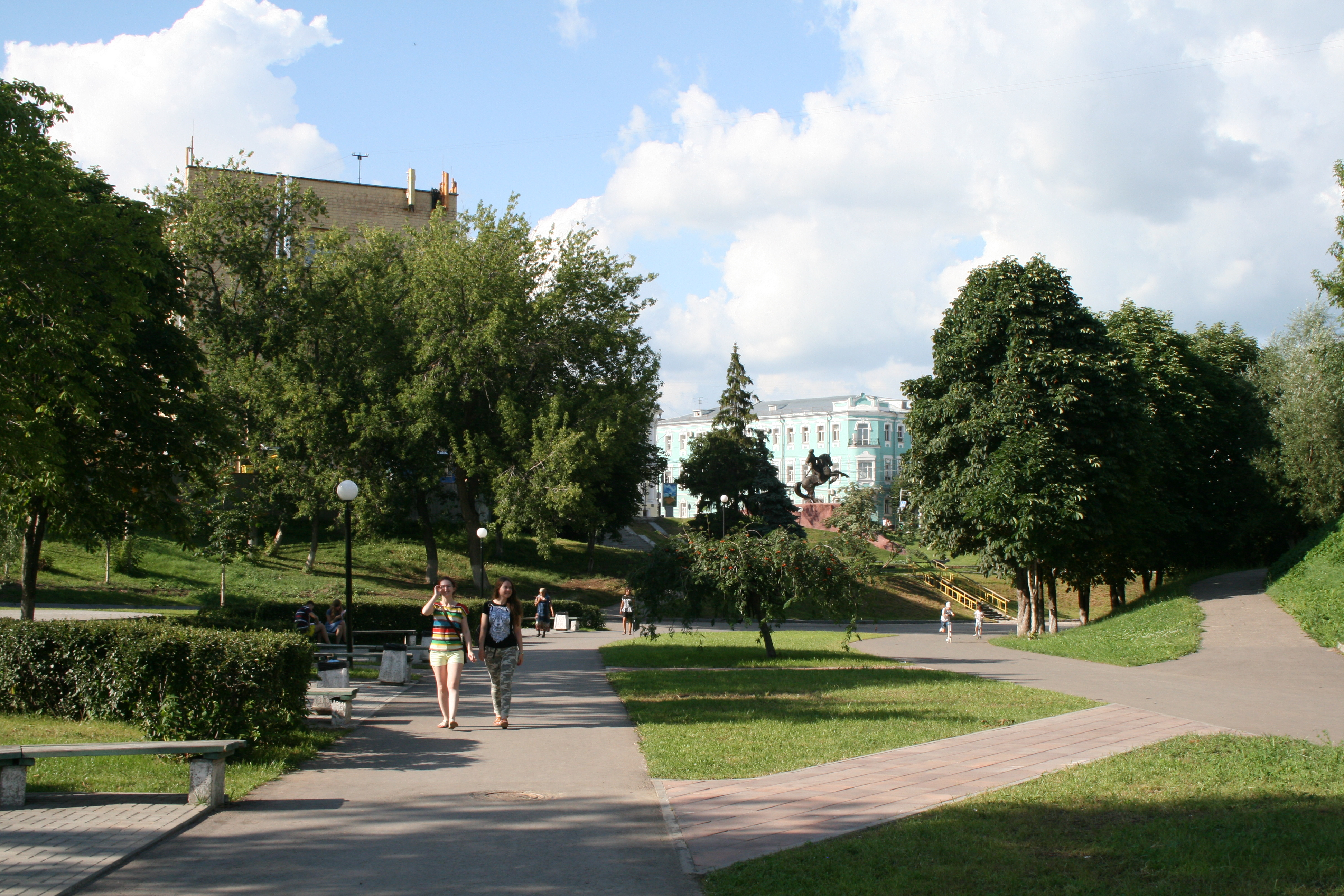 Лыбедский бульвар Рязани